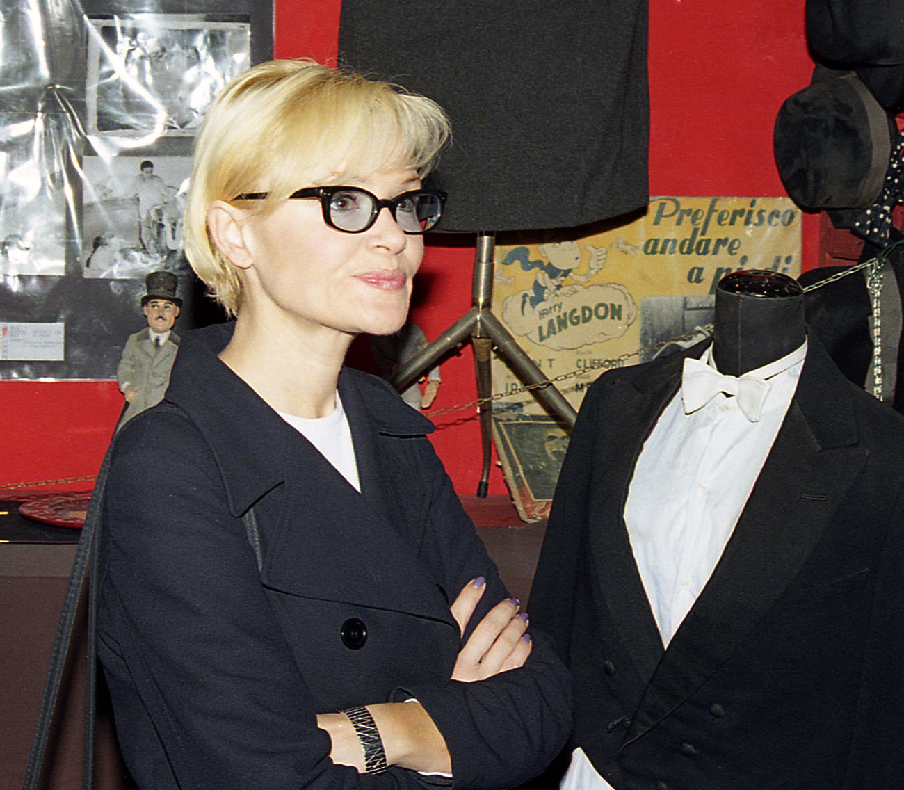 Chiara Noschese nel 1998.